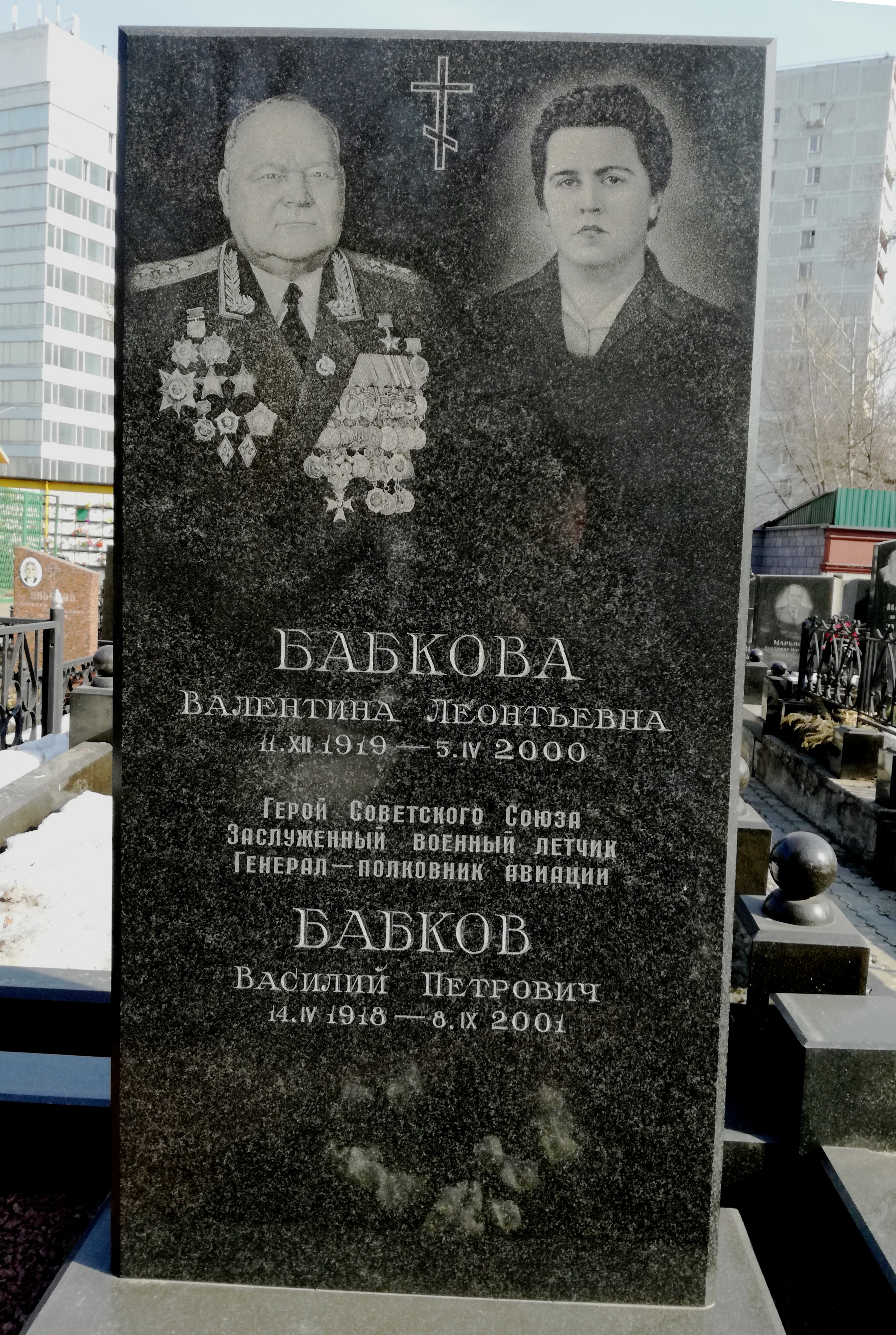 Даниловское кладбище